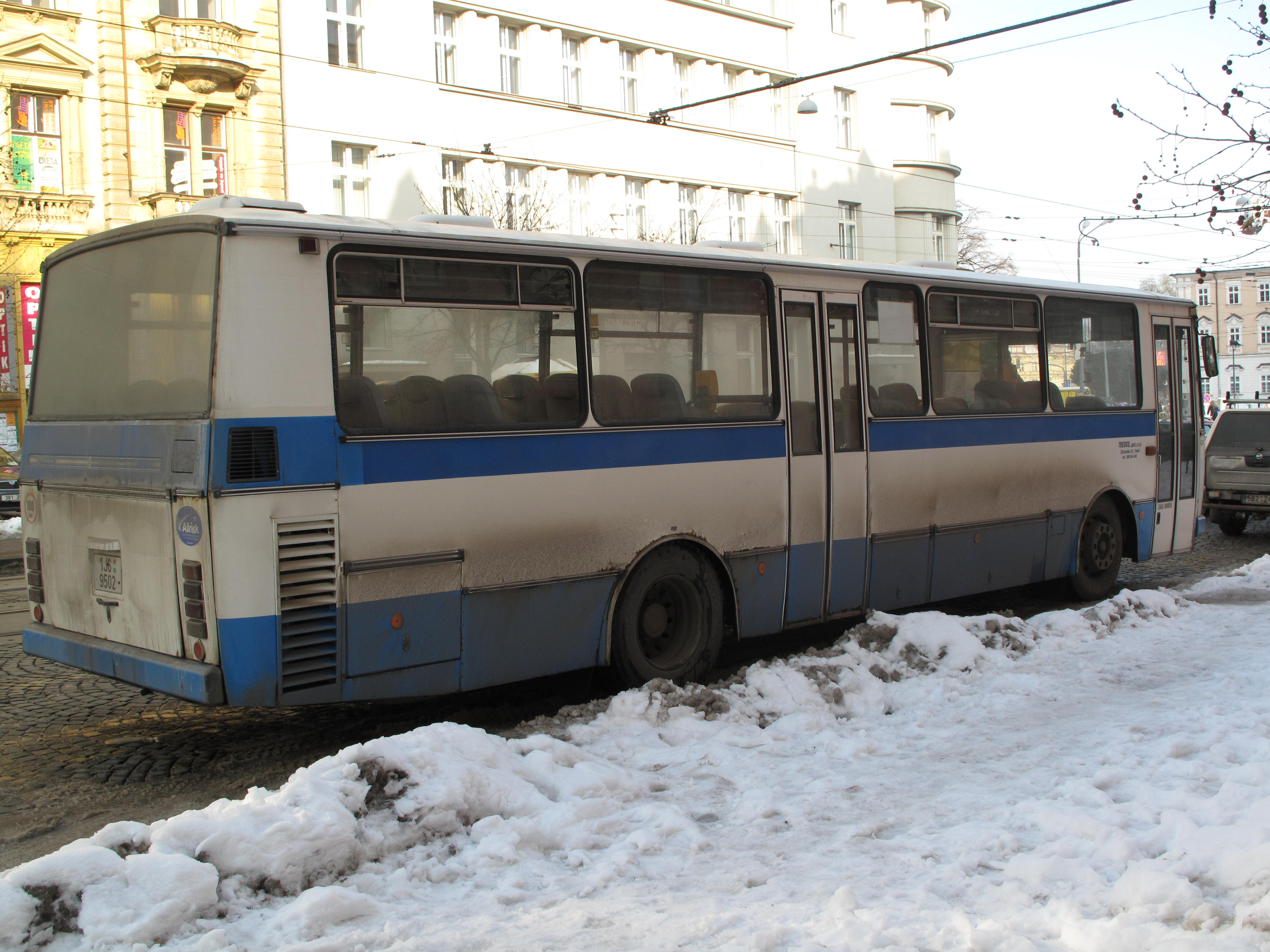 Brno začátkem roku 2010